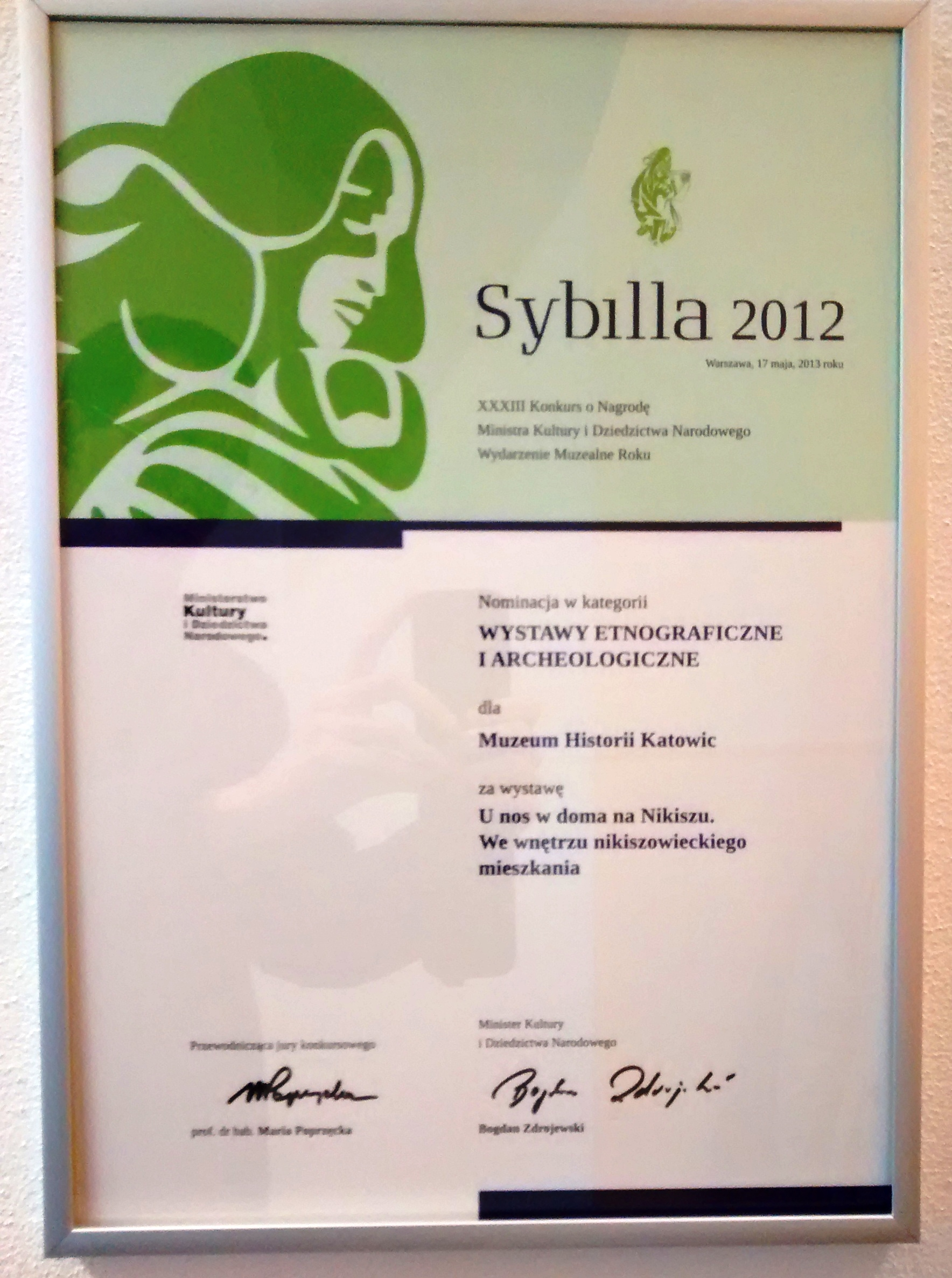 Muzeum Historii Katowic w 2013 zostało nominowane do nagrody „Sybilla 2012” za wystawę stałą „Woda i mydło najlepsze bielidło. W pralni i maglu na Nikiszowcu”, którą można zobaczyć w Dziale Etnologii Miasta MHK na Nikiszowcu.